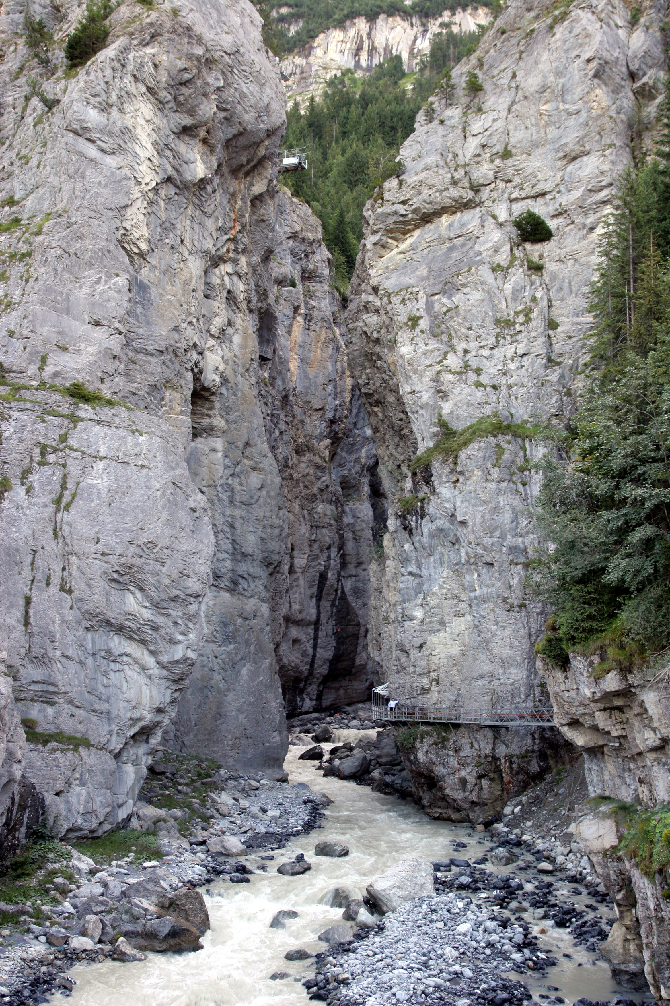 Der Eingang zur Schlucht des unteren Grindelwaldgletschers mit der Weissen Lütschine.